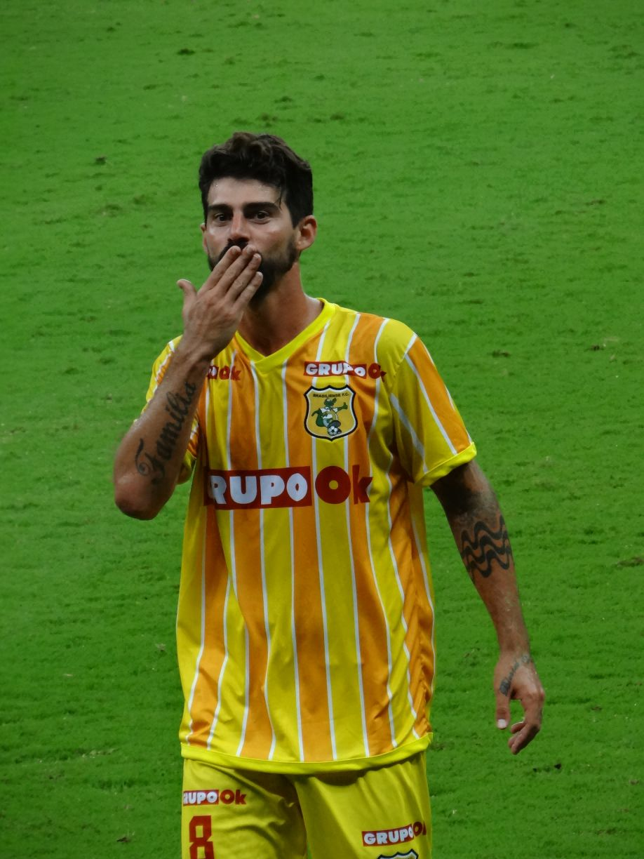 Final do Estadual Série A 2018 - Distrito Federal